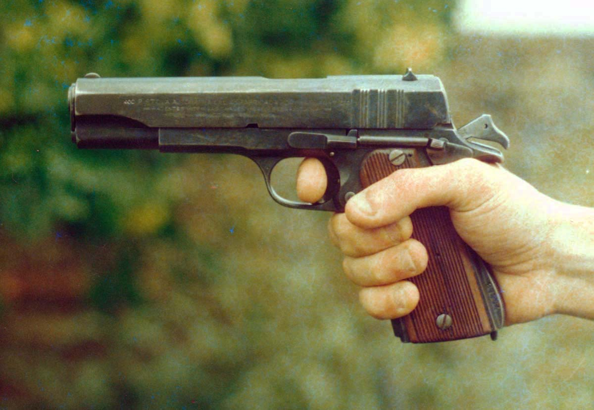 Lado izquierdo de una pistola Ballester Molina calibre .45 ACP